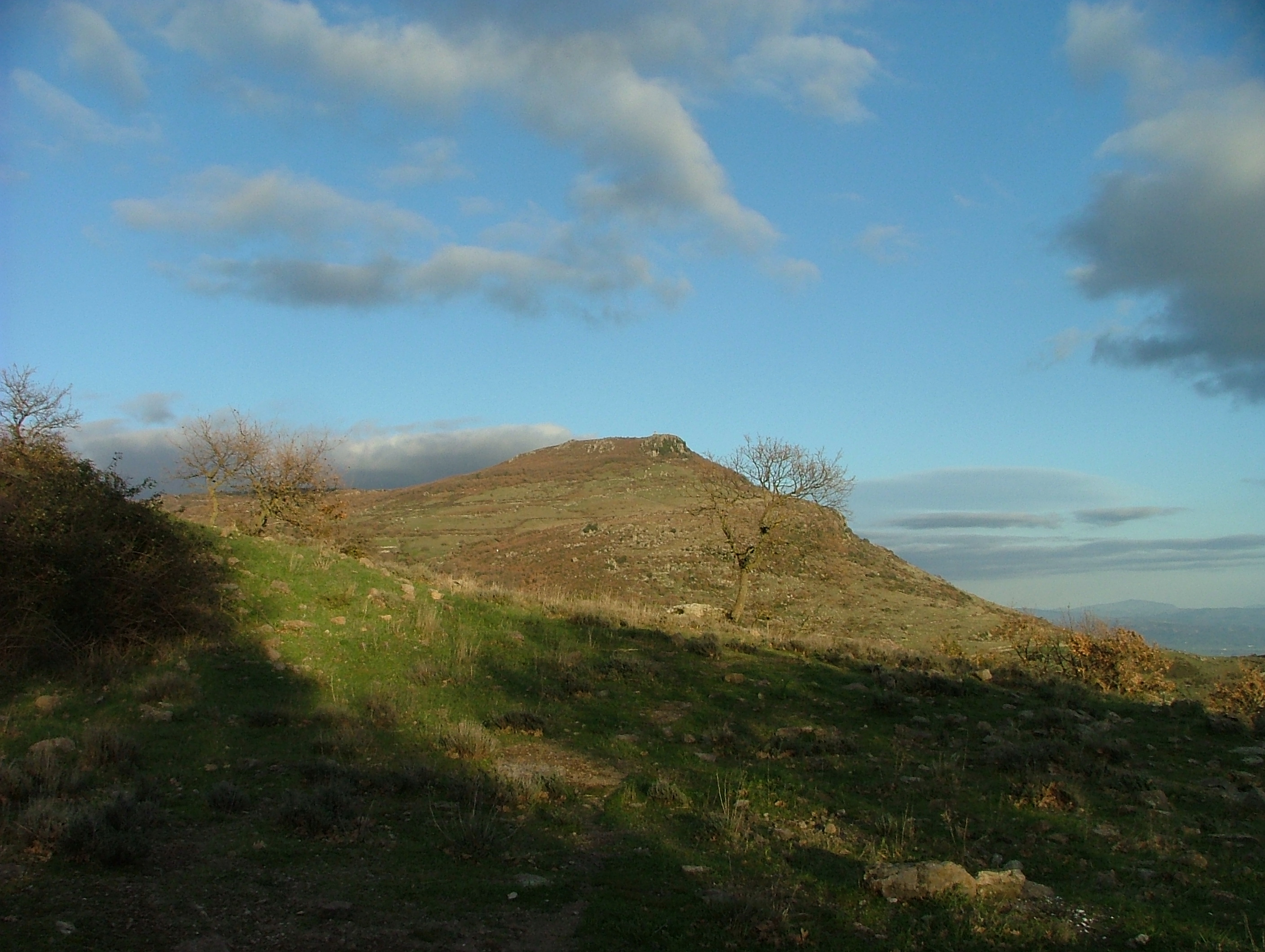 Il monte Santu Padre, Catena del Marghine, Sardegna